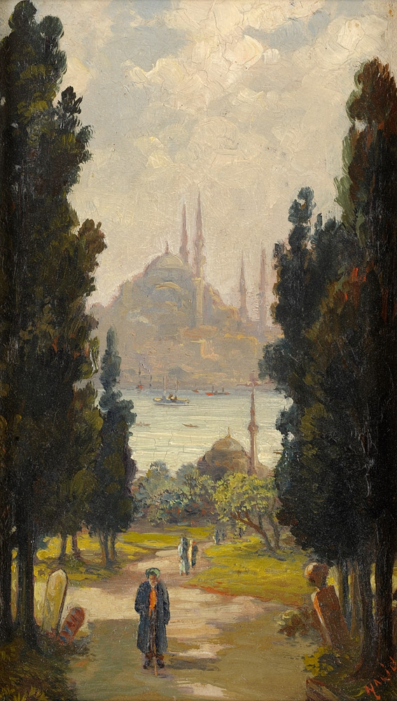 Ansicht von Istanbul. Signiert. Öl auf Malk., 29,5 x 17 cm